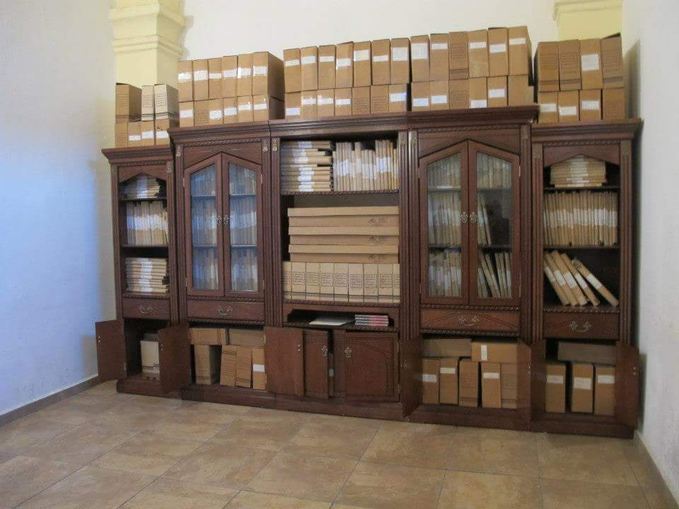 Fotografía del Archivo de la Hacienda de Santa Elena de Ojuelos.